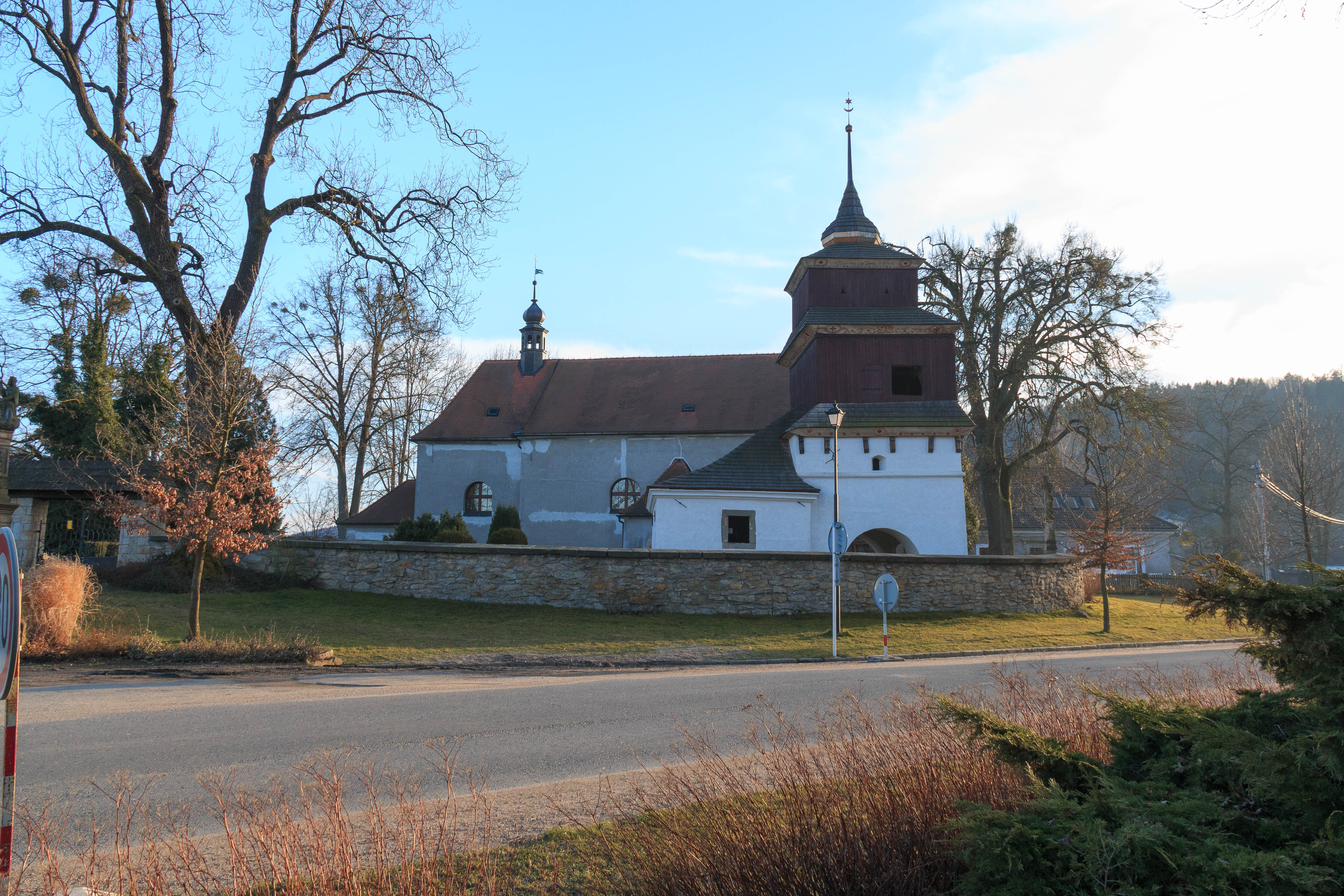 Kostel svatého Bartoloměje, Semanín.